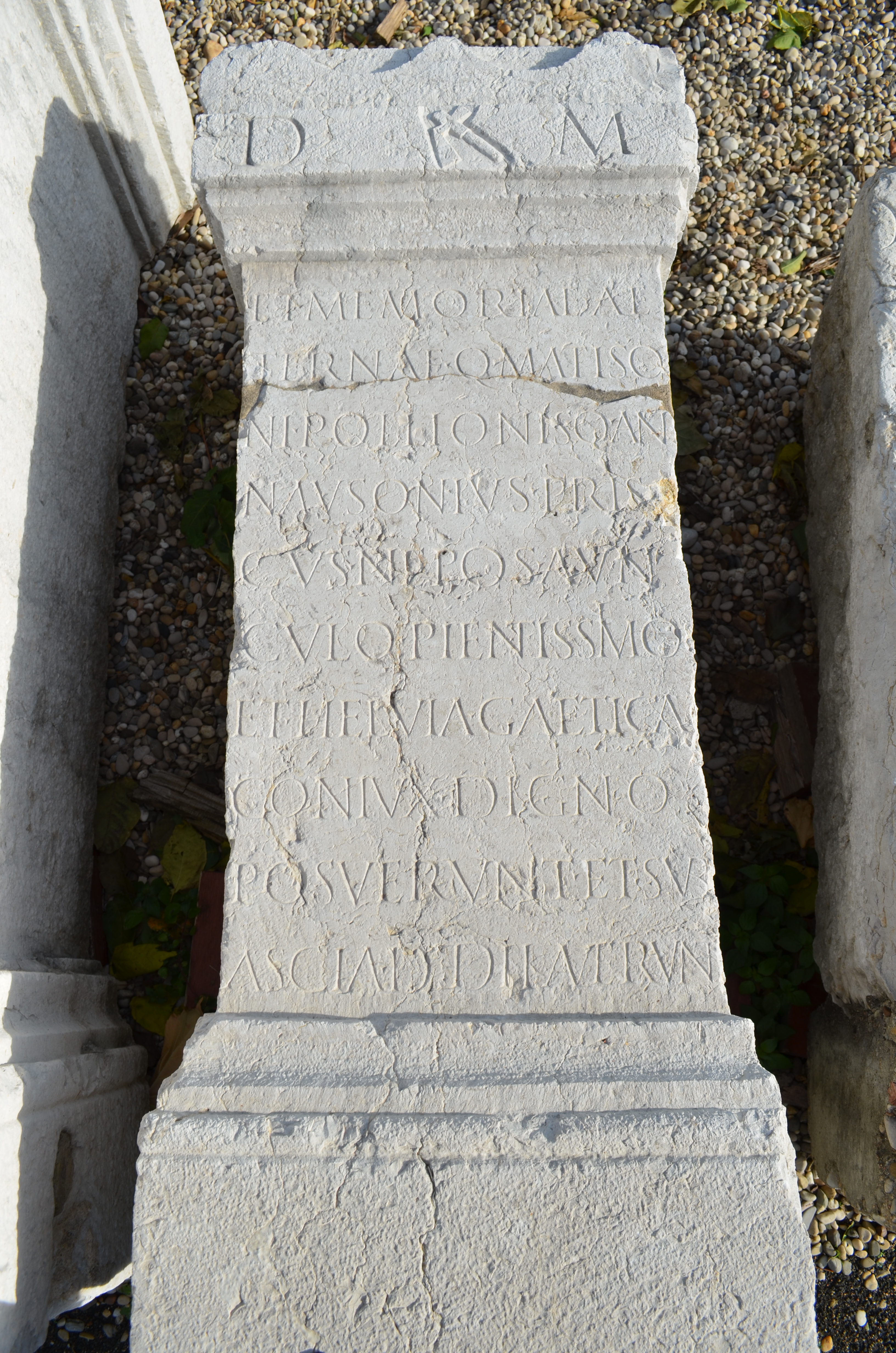 Musée gallo-romain de Fourvière (Lyon) - Jardin archéologique du théâtre antique de Lyon - Un cippe extrait du puits de Trion en 1886 : D(iis) M(anibus) / et memoriae ae/ternae / Q(uintus) Matiso(ni) Pollionis, Q(uintus) An/nius Ausonius Pris/cus nepos av(un)/culo pientissimo / et Helvia Gaetica / coniux digno, / posuerount et sub ascia dedicaverunt : Aux dieux Mânes et à la mémoire éternelle de Quintus Matisonius Pollio ; Quintus Annius Ausonius Priscus son neveu, à son excellent oncle, et Helvia Gaetica sa femme à son digne époux, ont élevé (ce tombeau) et l'ont dédié sous l'ascia.